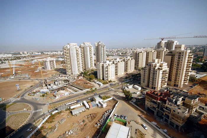 Em HaMoshavot, Petah Tikva